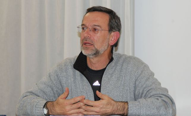 El profesor de la Universidad de León, Enrique Javier Díez Gutiérrez, impartiendo una conferencia de educación en 2016